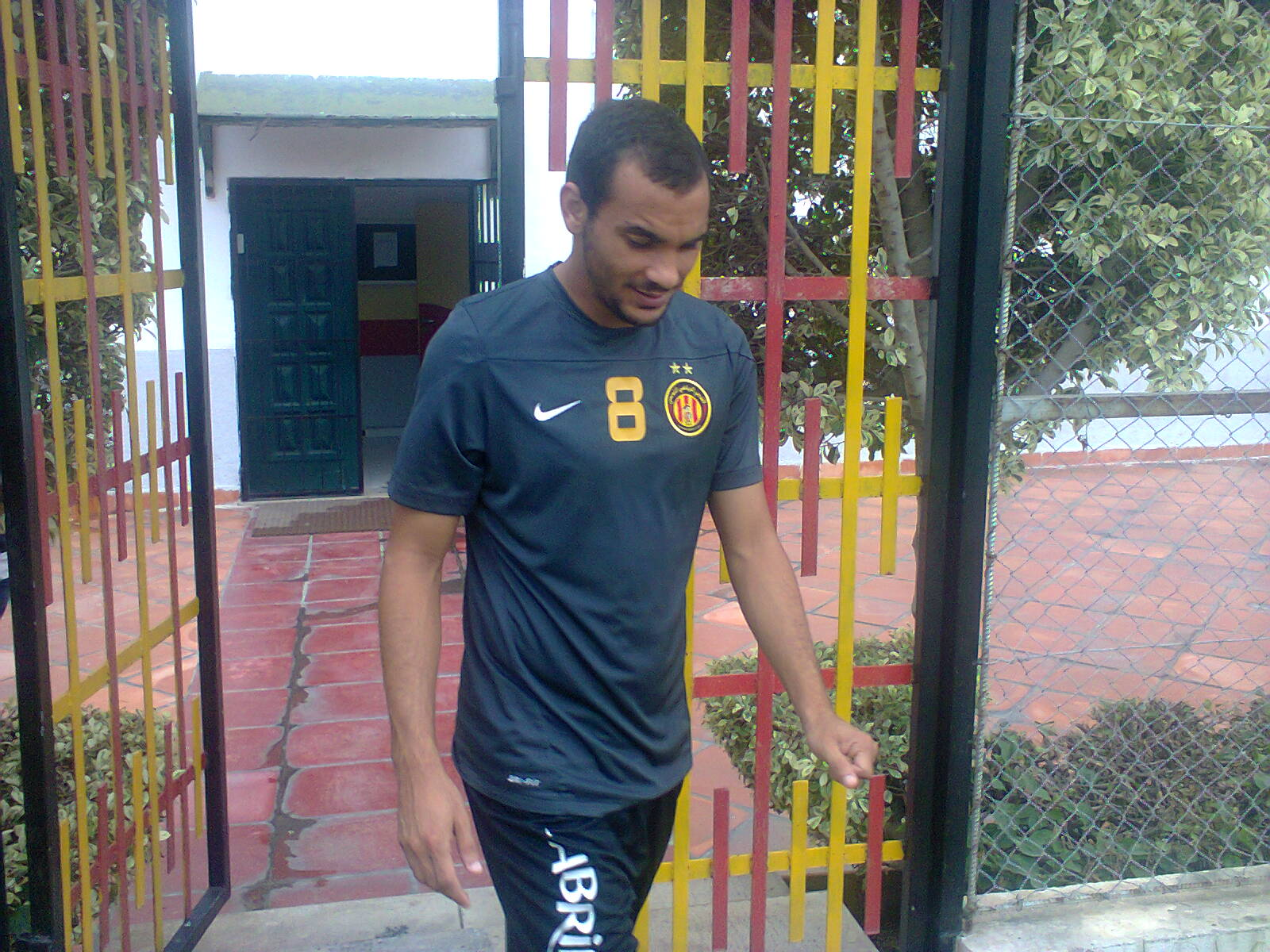 Idriss Mhirsi lors de la séance d'entraînement du 15 septembre 2015